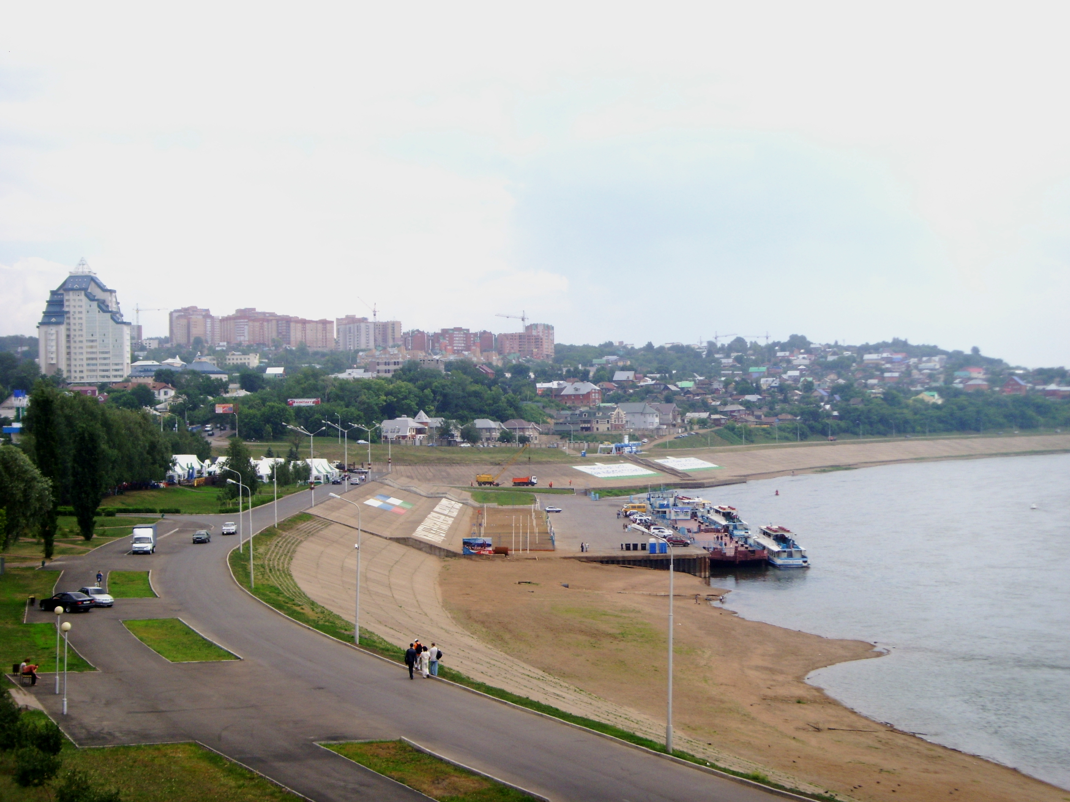 Уфа. Набережная Белой реки в районе монумента Дружбы.